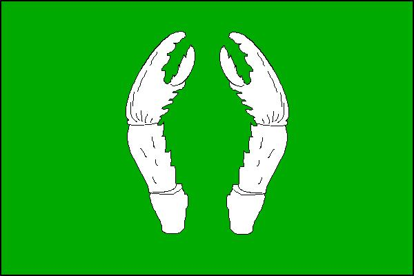 Vlajka obce Vohančice